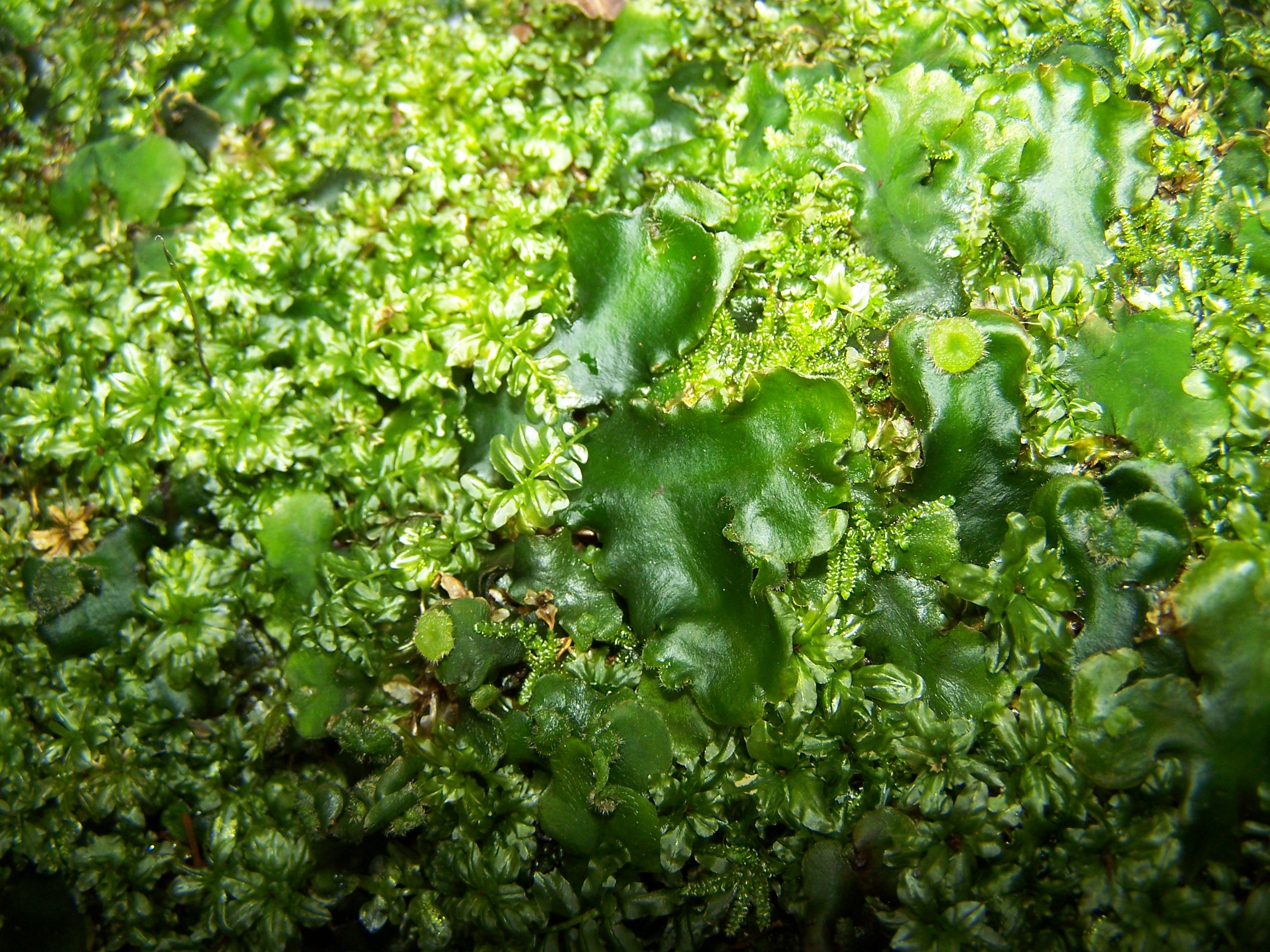 Sunda: Koléksi lulukutan di Kebon Raya Cibodas